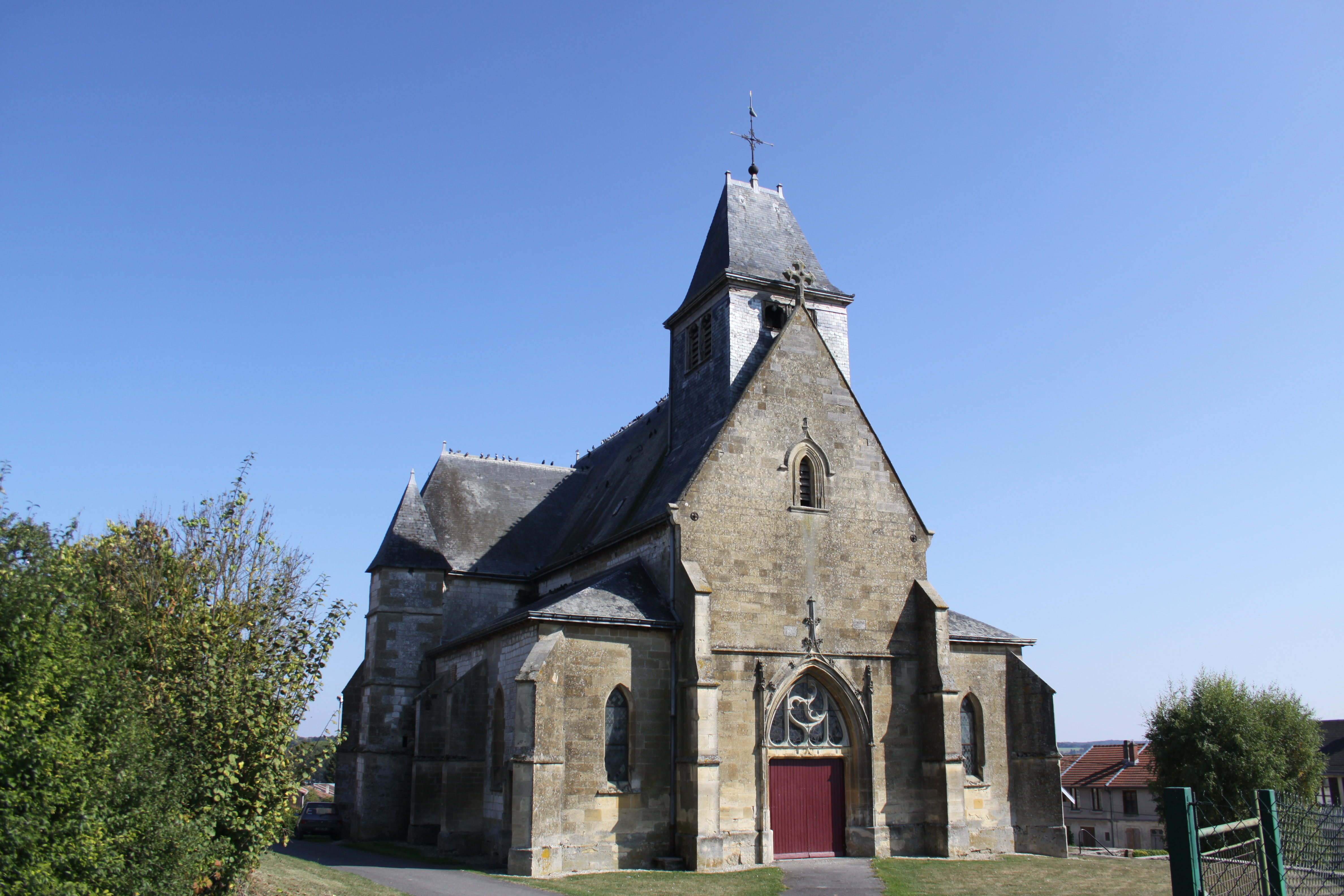 Église Saint-Maurice de Vrizy (Ardennes, France) .